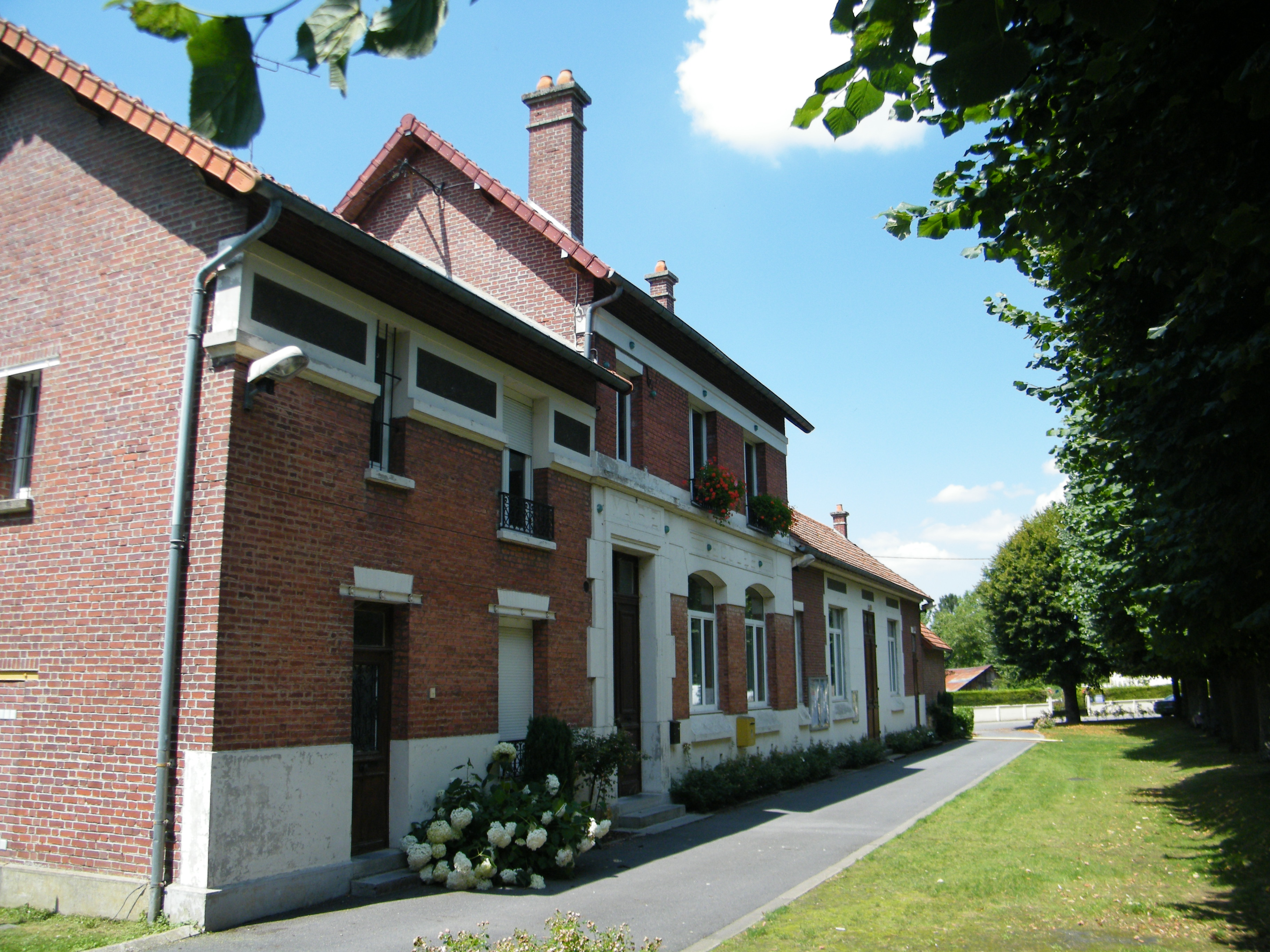 Mairie-école.